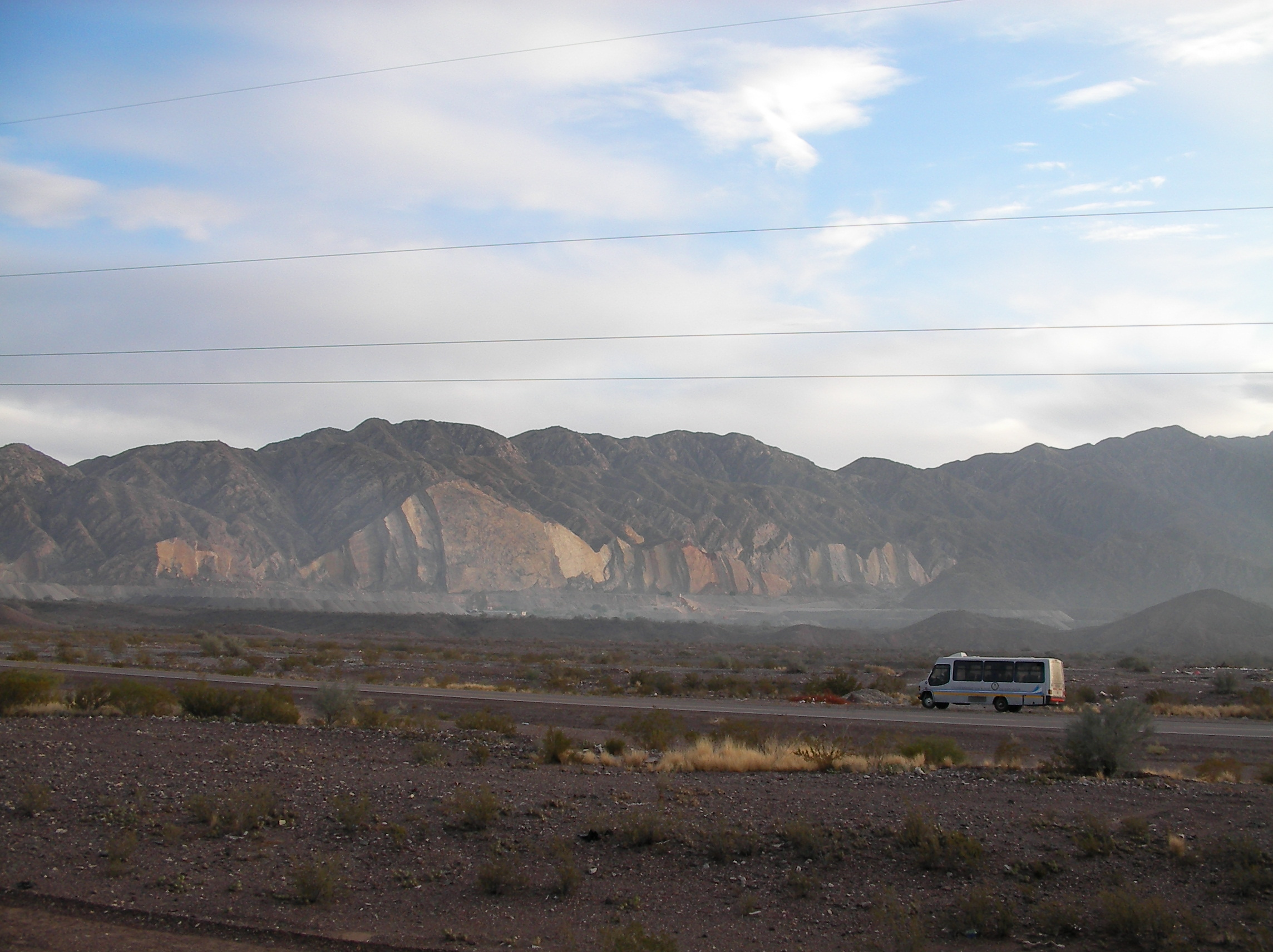 Vista de la Serranías del Villicúm, en el departamento Albardón, ptovincia de San Juan, Argenrina